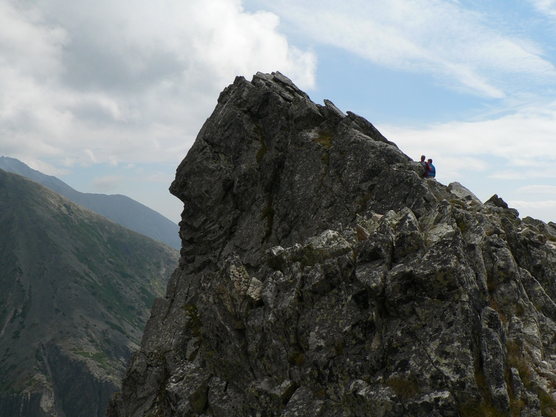 Vrchol Predného Soliska od severu.